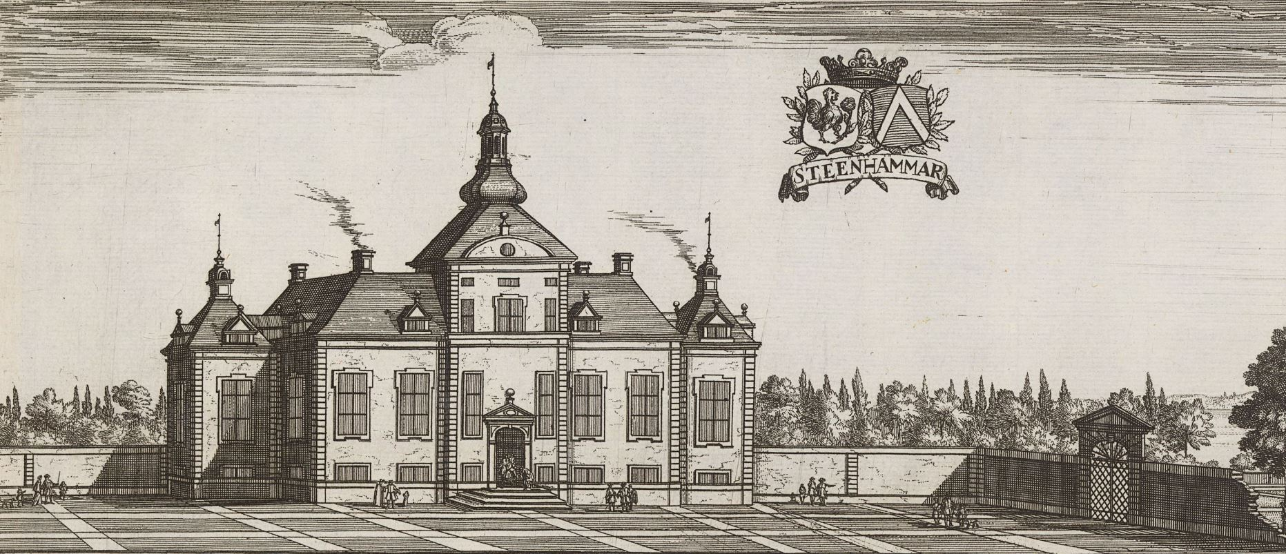 Stenhammar slott Padtbrugge, Herman, 1656-1687 (Gravör) Dahlbergh, Erik, 1625-1703 (Kommissarie)